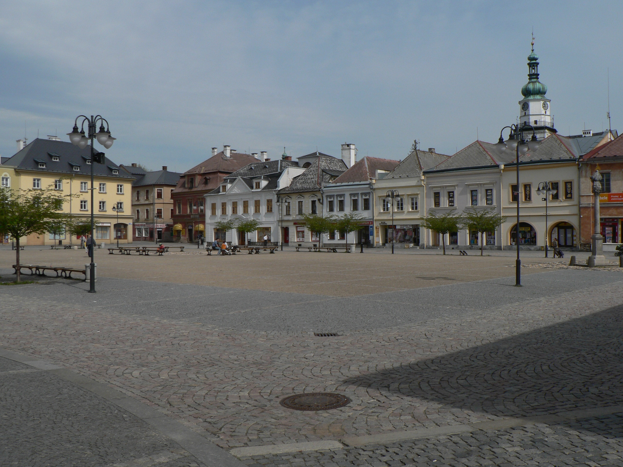 Náměstí v Bruntále